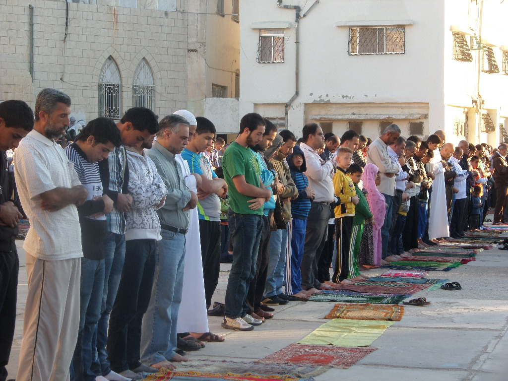 صلاة عيد الأضحى عام 2015م